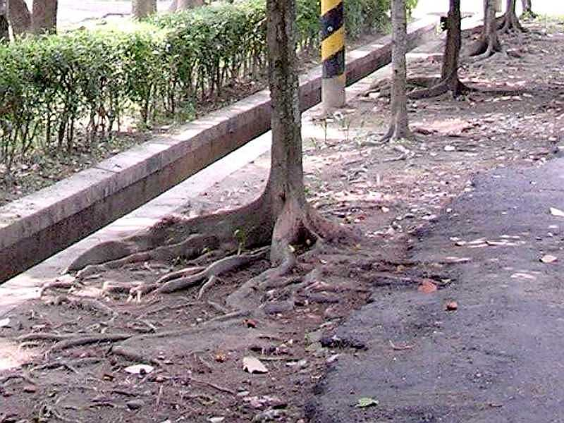 銀葉樹的板根